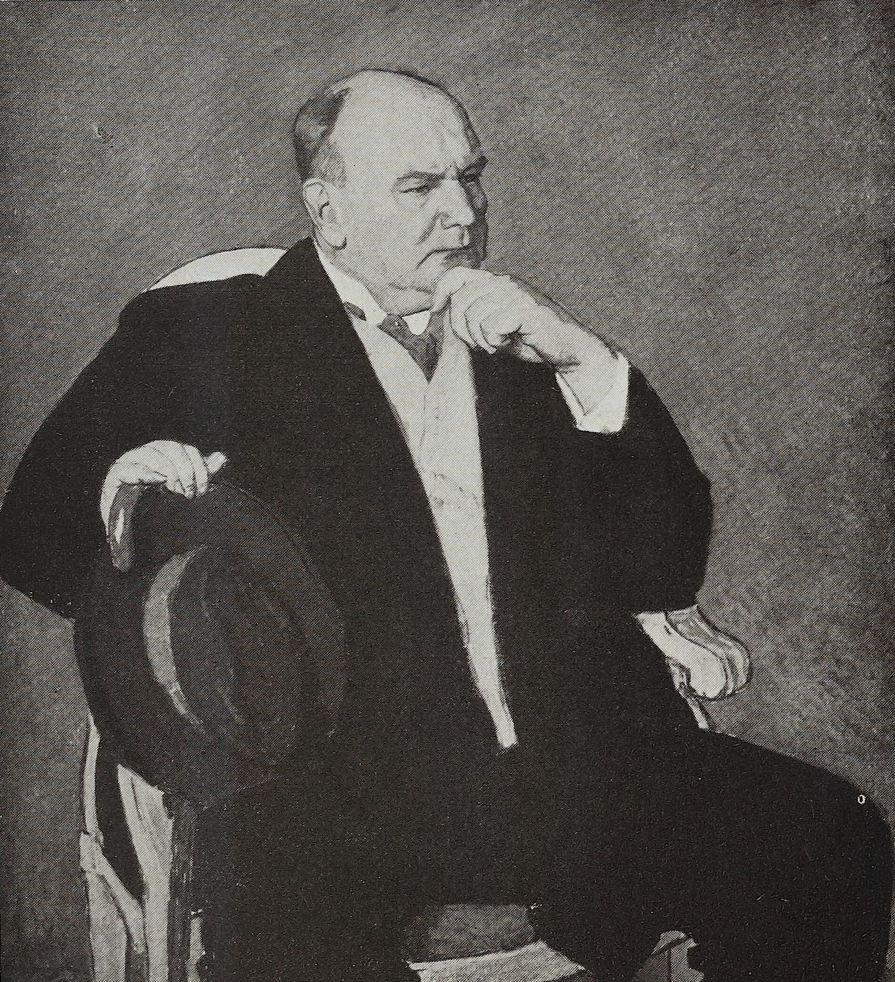 Portrait des Staatssekretärs Dr. Wilhelm Solf